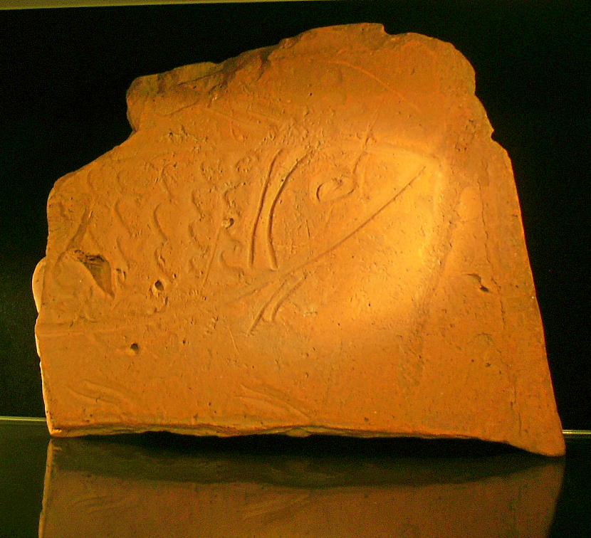 Römischer Ziegel mit der eingeritzten Darstellung eines Fischkopfes (RM Wallsee)